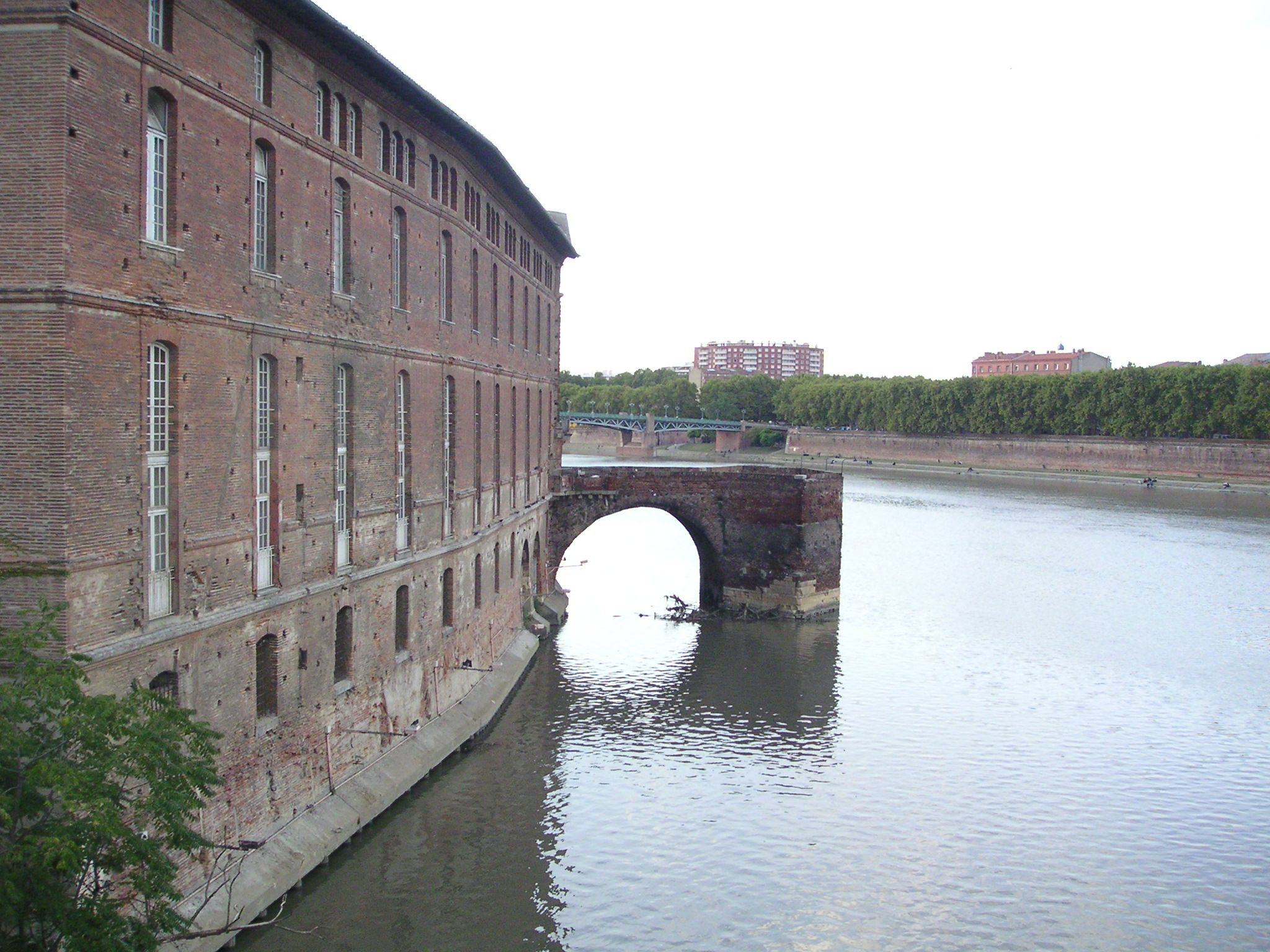 L'Hôtel-Dieu Saint-Jacques à Toulouse, France.